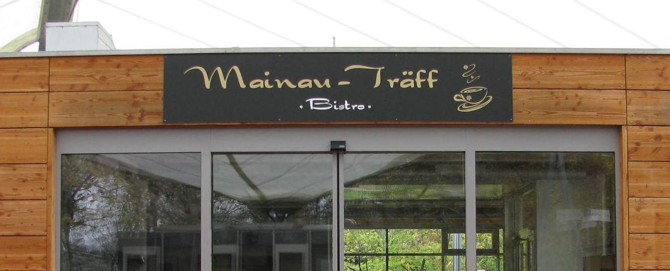 Mainau Träff Phonetische Schreibweise 2014